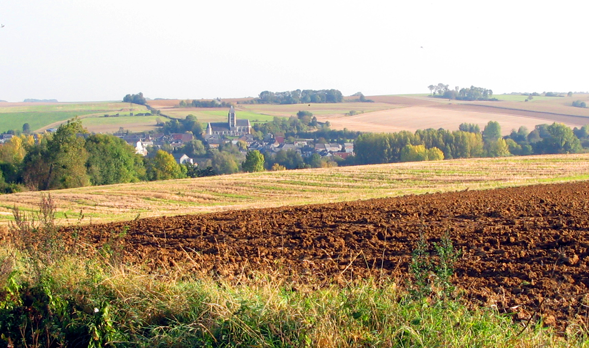 Chaourse (Aisne, France) - Chaourse et la vallée de la Serre, vus depuis la route sinueuse descendant de la D 946 (juste à l'ouest de Montcornet). On remarque au premier plan un fossé coupant les champs pour draîner les eaux de pluie. Ce fossé n'est pas le fossé de bord de route. Il prolonge même la route qui tourne justement à gauche à cet endroit précis.